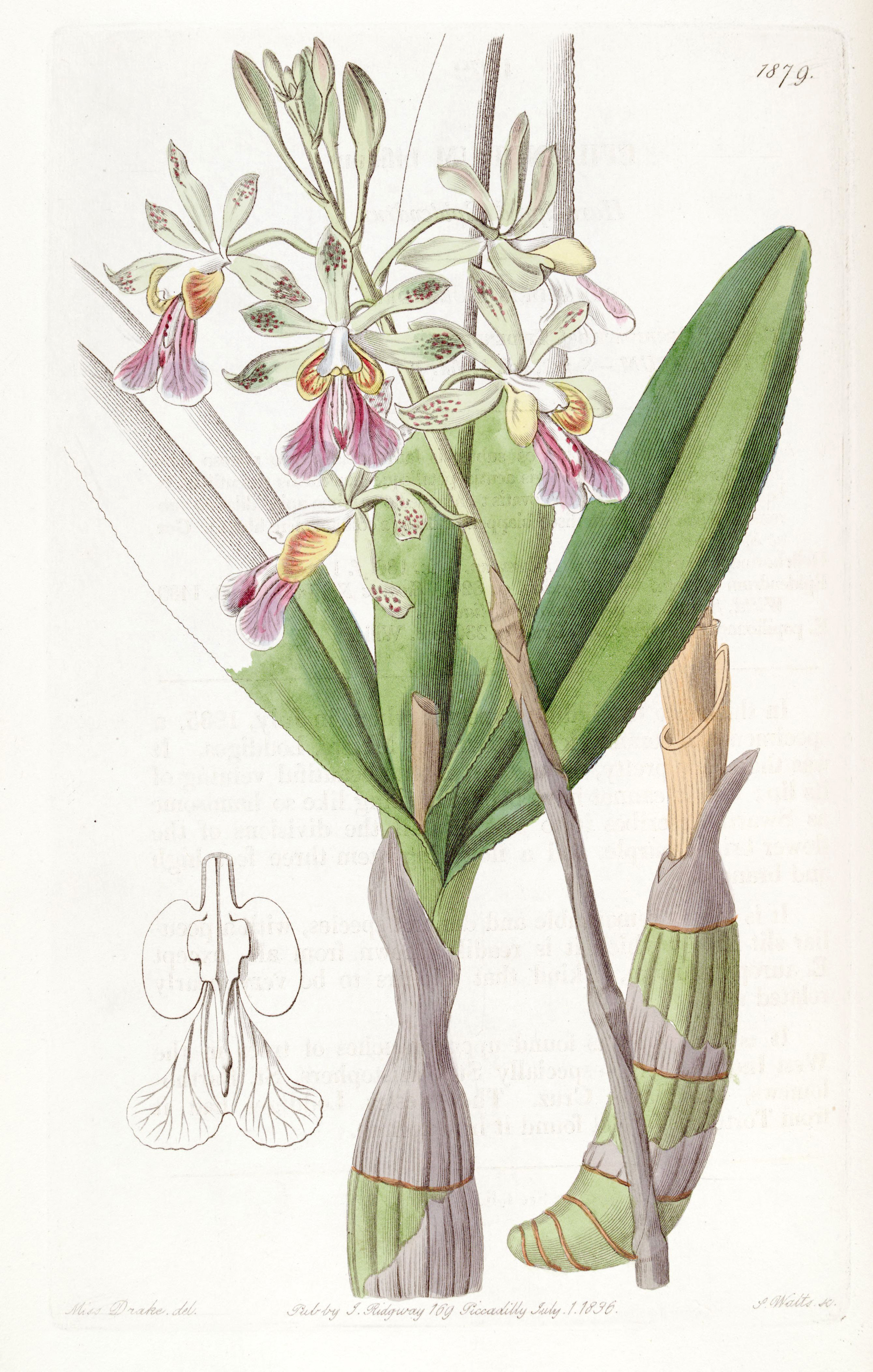 Psychilis bifida (as syn. Epidendrum bifidum)